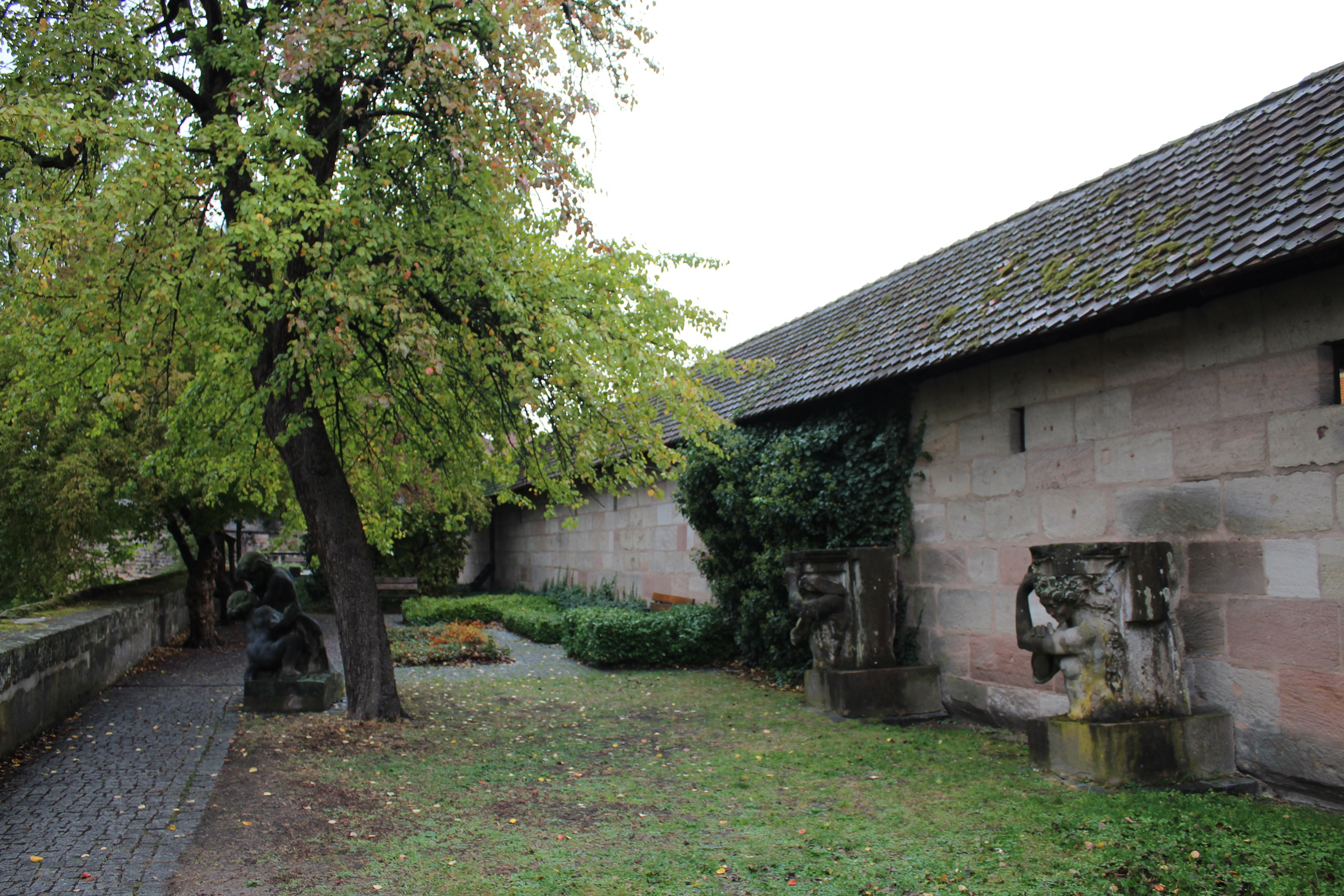 Skulpturen im Bürgermeistergarten